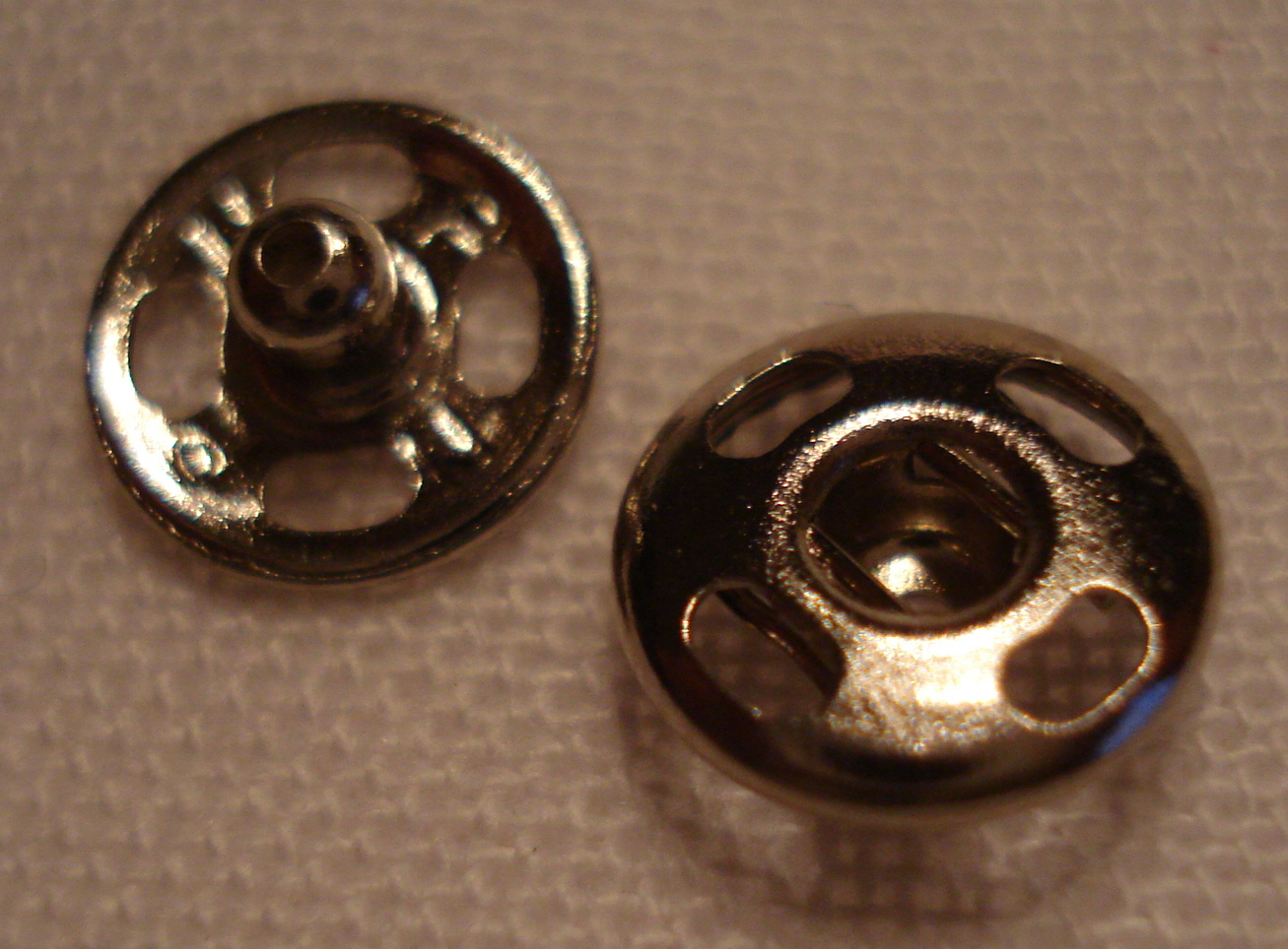 Prembutono